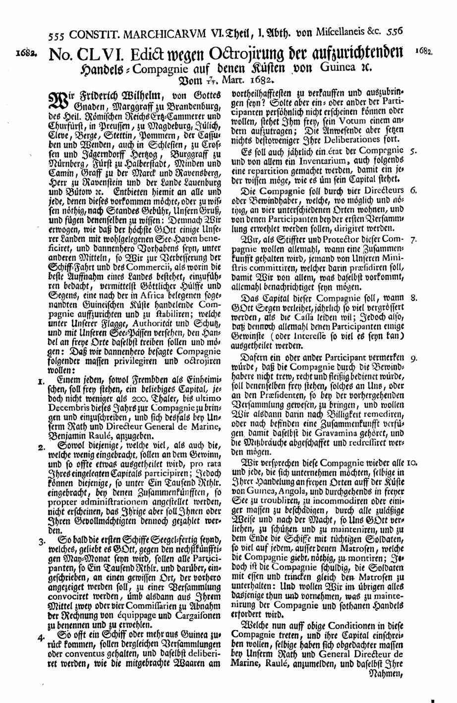 "Edict wegen Octroyierung der aufzurichtenden Handelscompagnie auf denen Küsten von Guinea" vom 17. März 1682